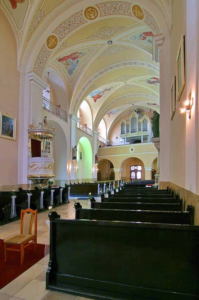 Pyskowice - kościół parafialny pw. św. Mikołaja (zabytek nr A/289/60 z 7.03.1960)